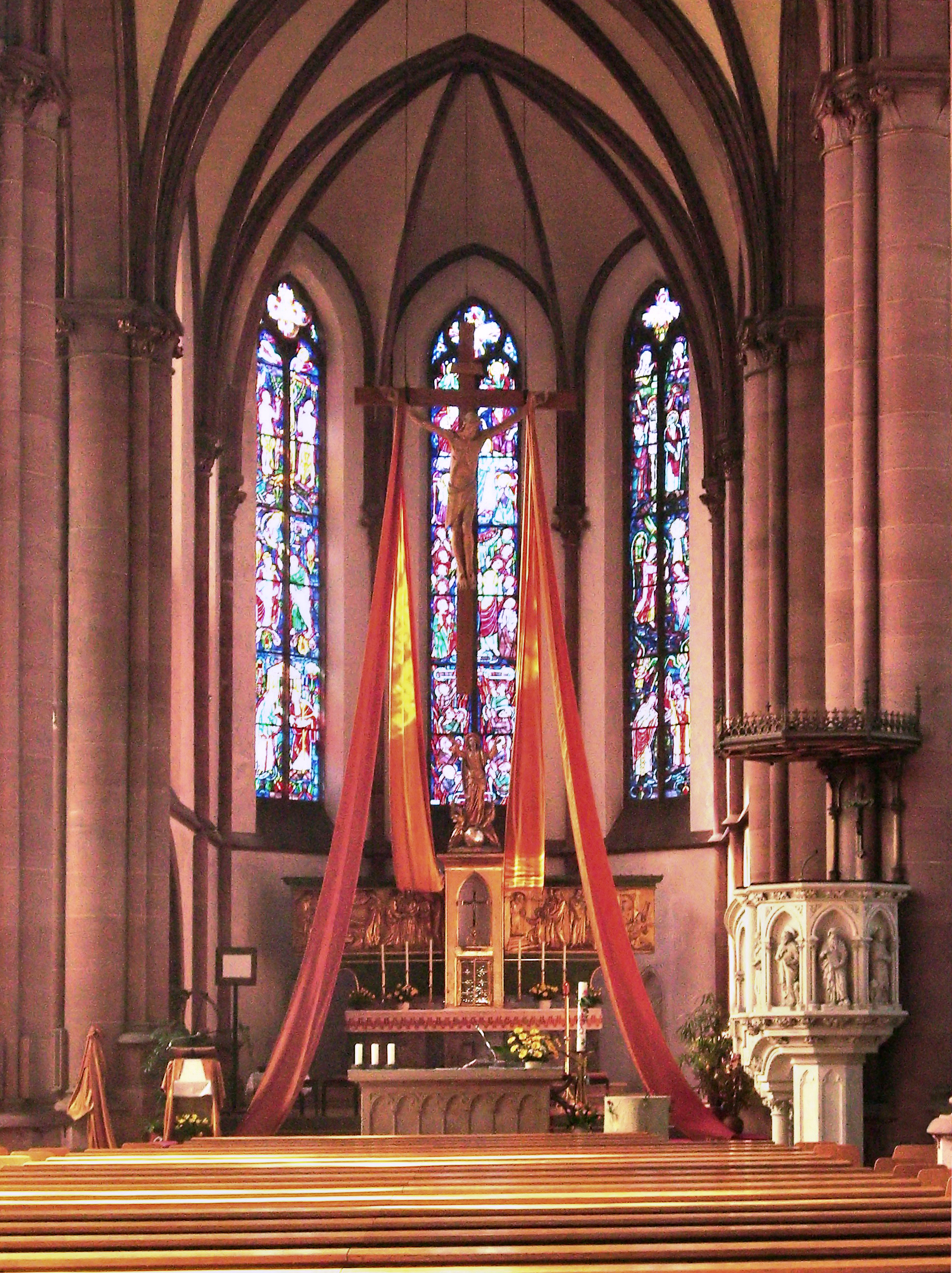 Marienkirche Kaiserslautern innen